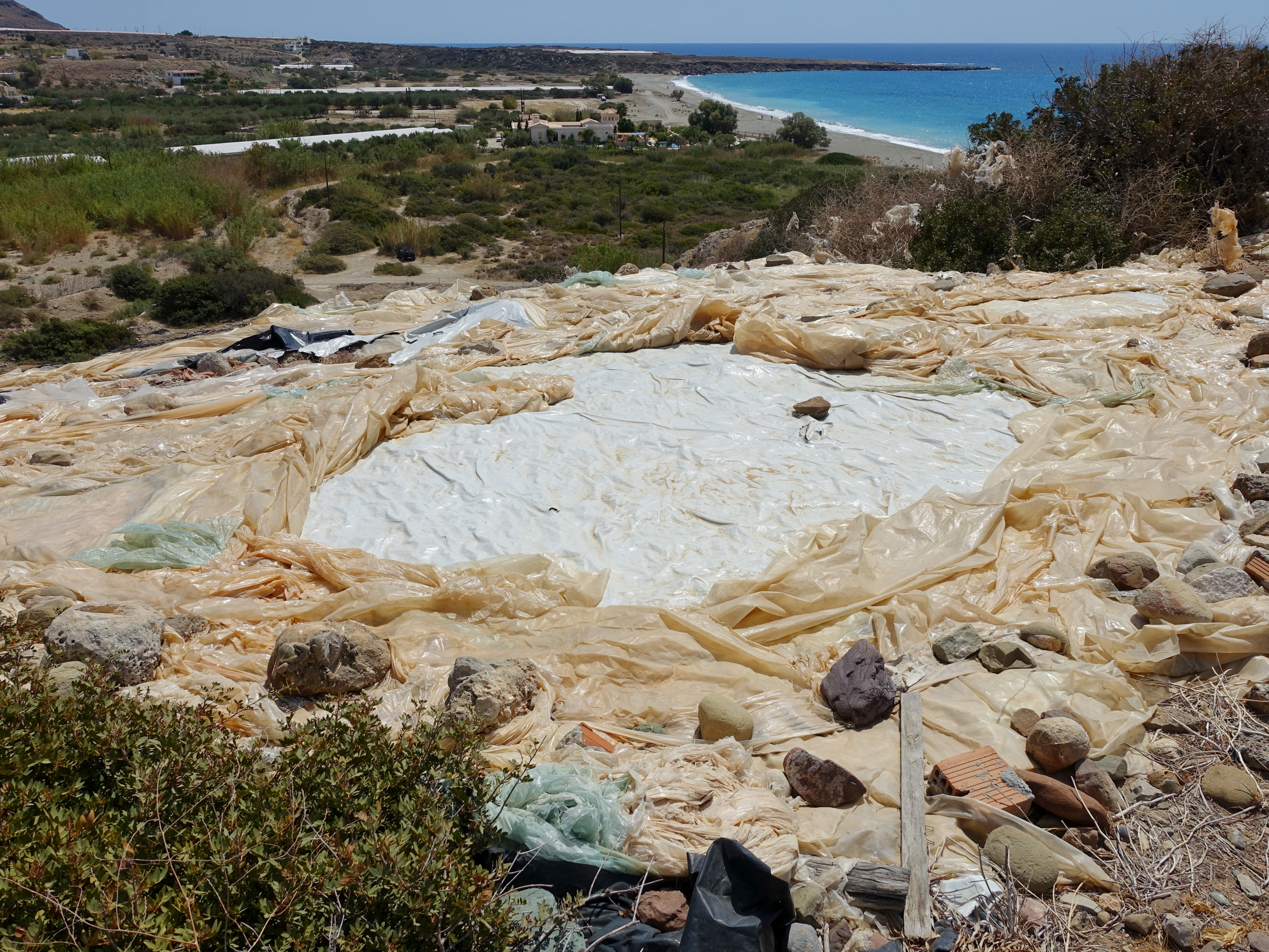 Hügel Vigla (Βίγλα ‚Wache‘) hinter dem Strand von Diaskari (Παραλία Διασκάρι), Gemeinde Sitia, Kreta, Griechenland